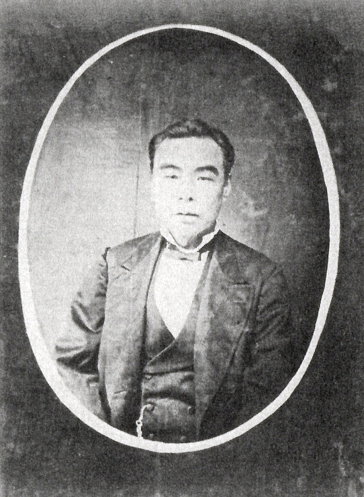 松浦脩の肖像写真。